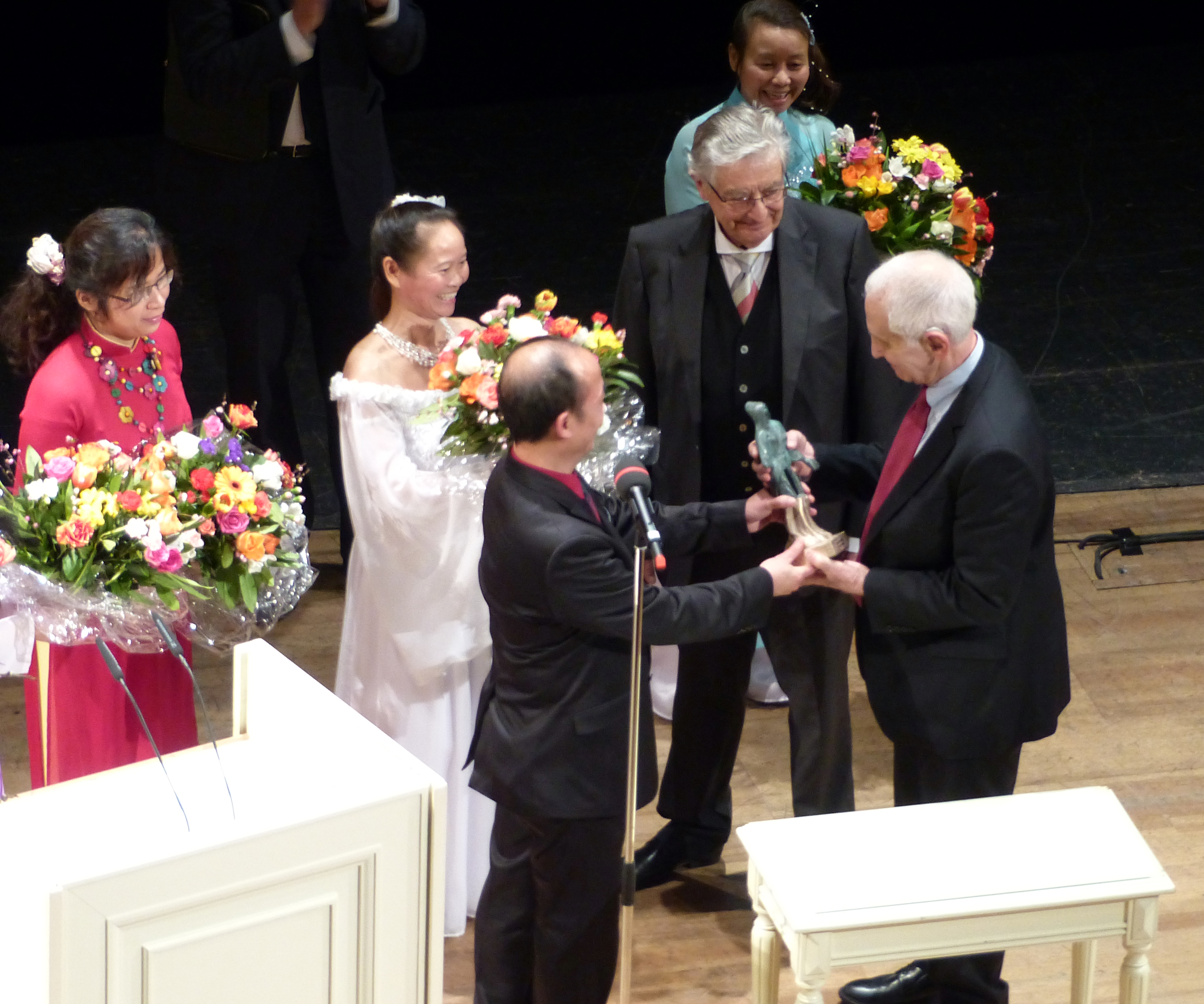 Daniel Ellsberg in Dresden anlässlich seiner Auszeichnung mit dem Dresdner Friedenspreis am 21.2.2016 in der Semperoper, mit Gerhart Baum (Moderator) und Jakob Augstein (Laudator) sowie Bui Truong Binh (Preisübergeber)